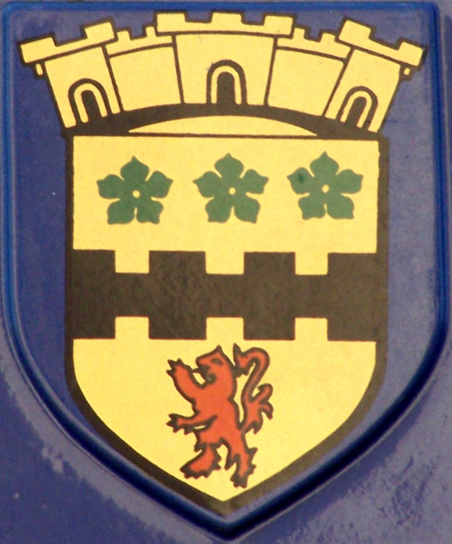 Blason de Saint-Nom-la-Bretèche (Yvelines, France)